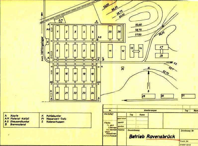 Plan vom Siemenslager Ravensbrück